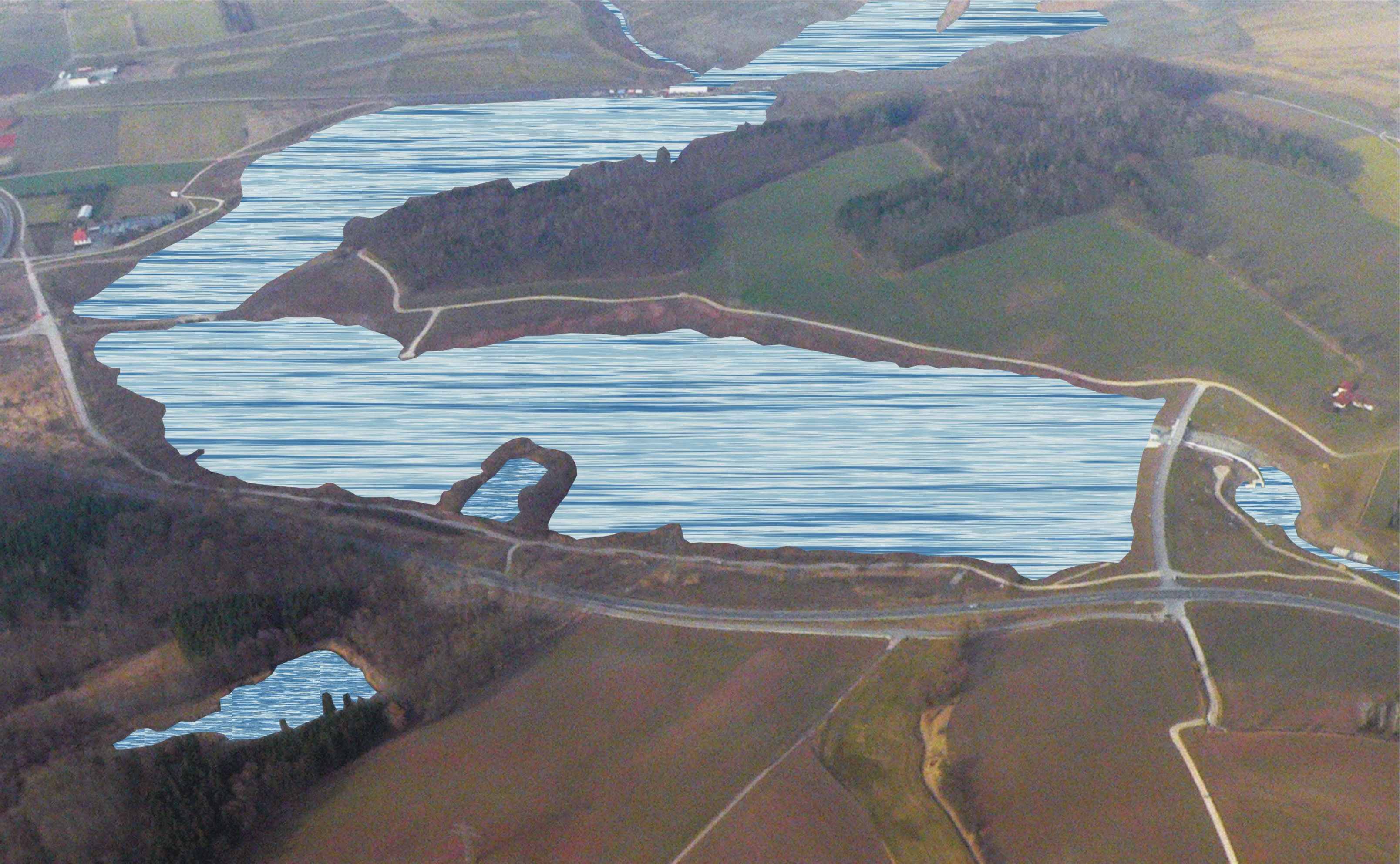 Hochwasserrückhaltebecken Goldbergsee in Coburg, Bayern - geplanter Endfüllstand 2011